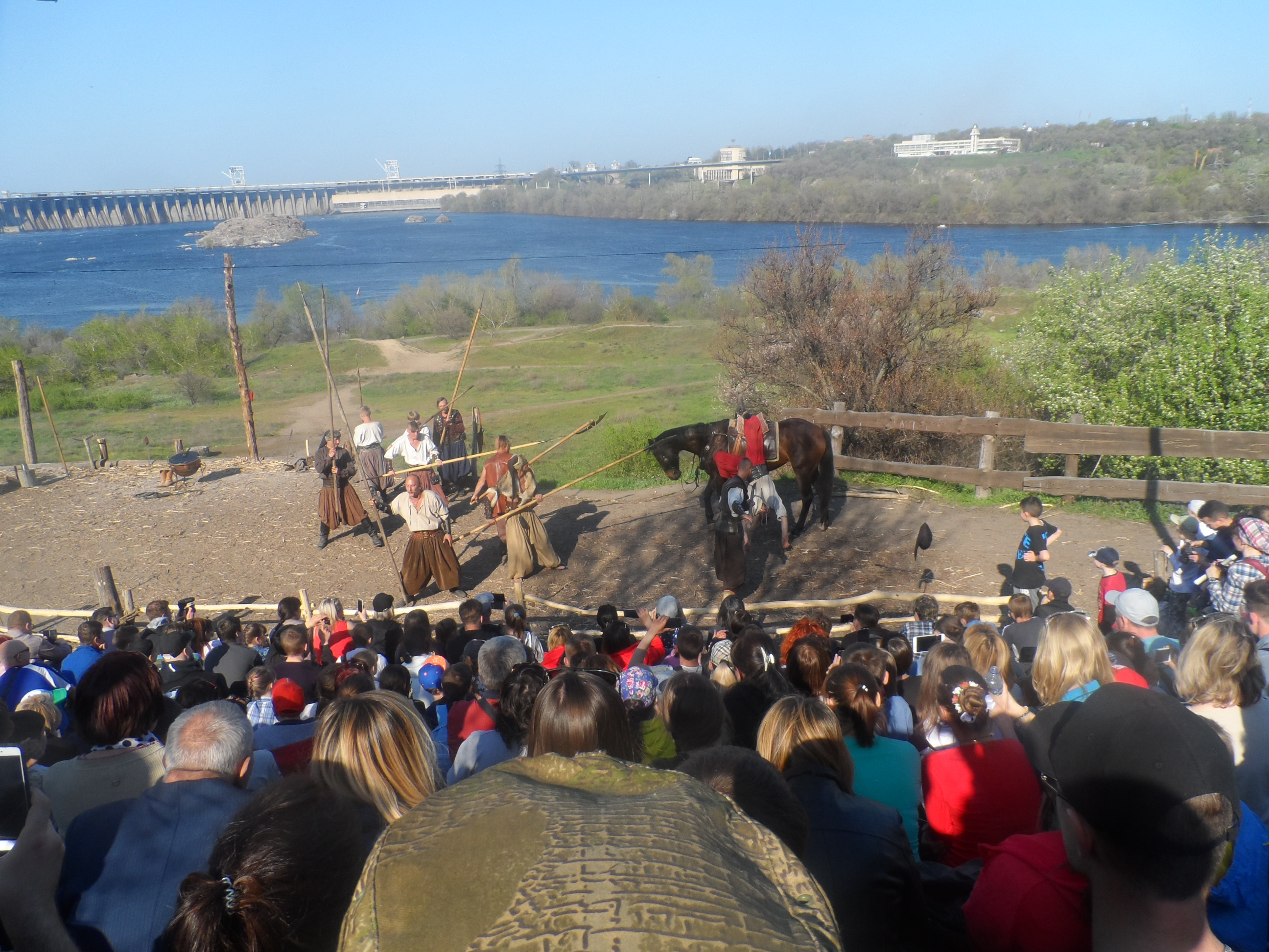 Хортица